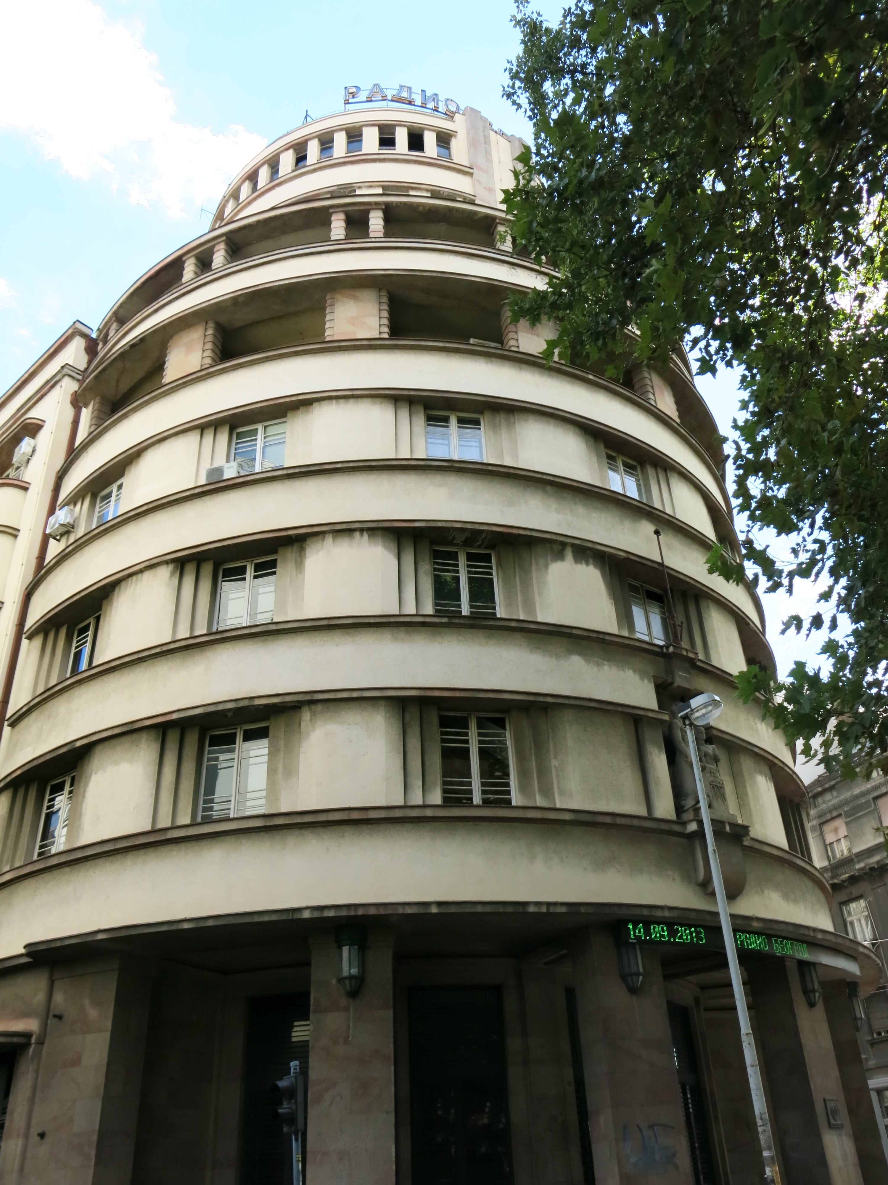 Занатски дом